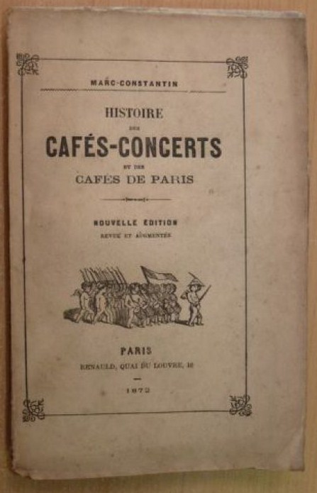 Couverture d'un livre de Marc Constantin : Histoire des cafés-concert et des cafés de Paris - Renauld éditeur Paris